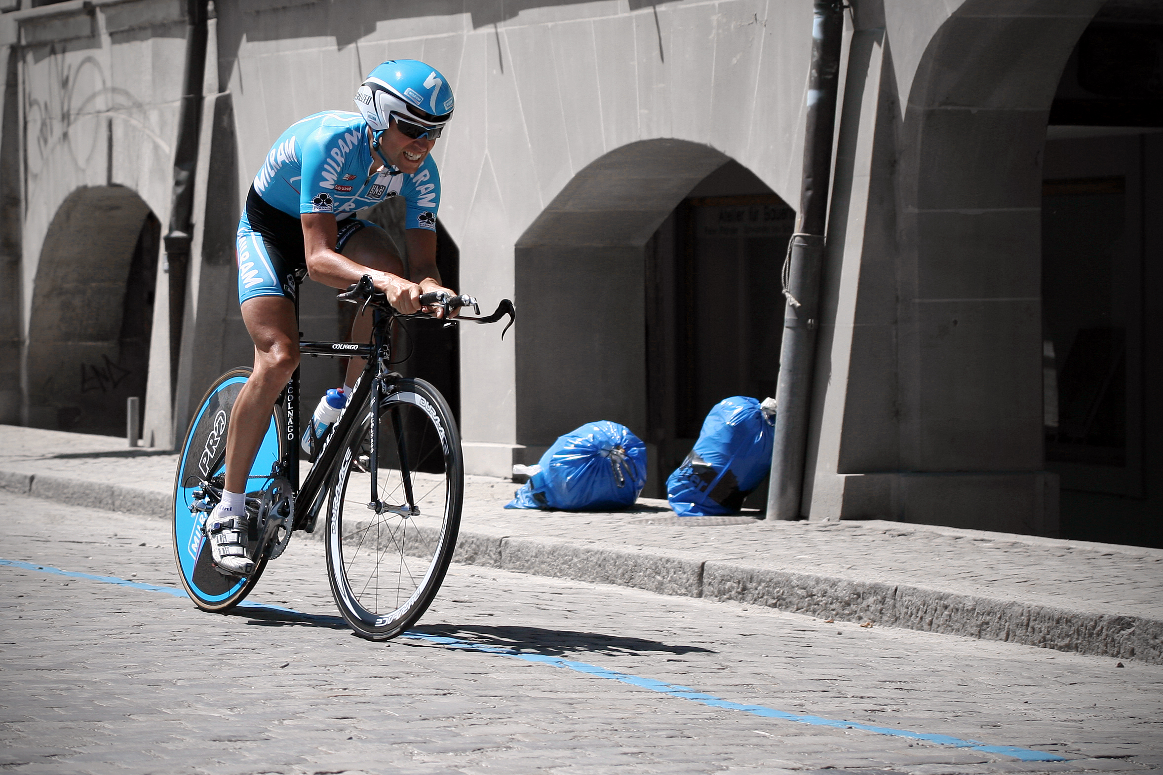 Mirko Celestino, Bern, Switzerland (Einzelzeitfahren Tour de Suisse 2007)